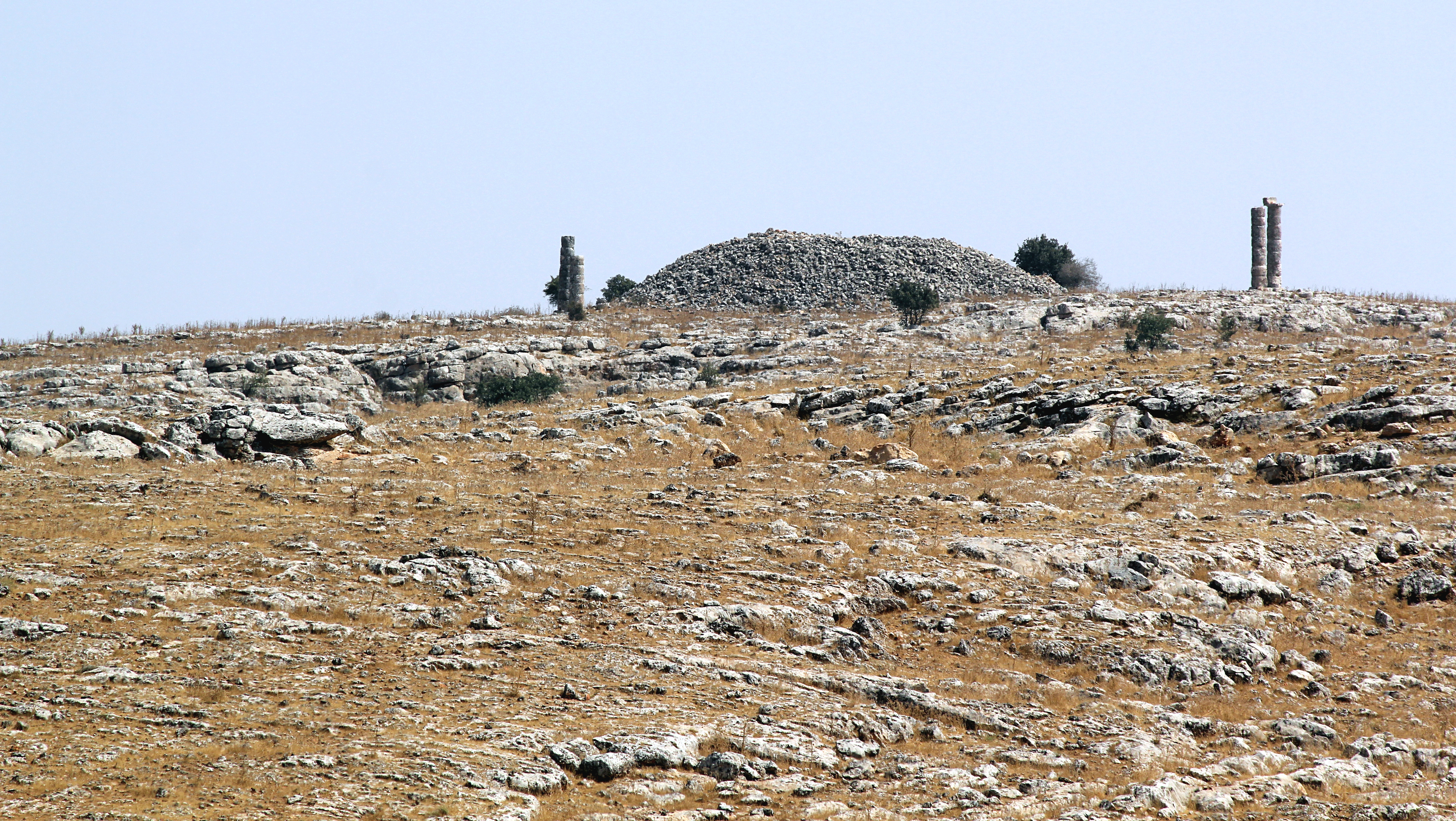 Grabhügel von Sesönk, Kommagene, Südosttürkei